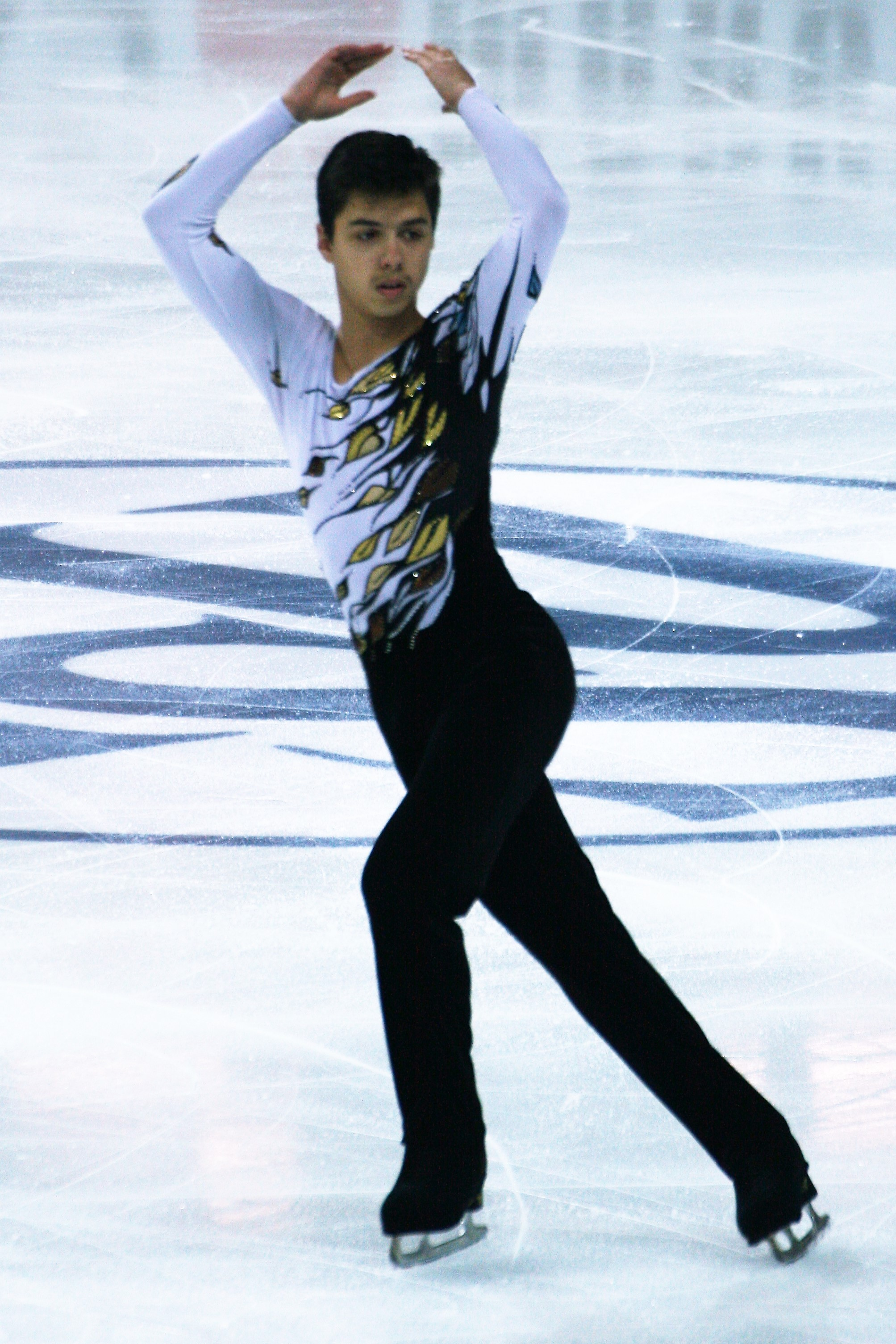 Роман Савосин (Россия) на финале Гран-при по фигурному катанию среди юниоров 2016-2017